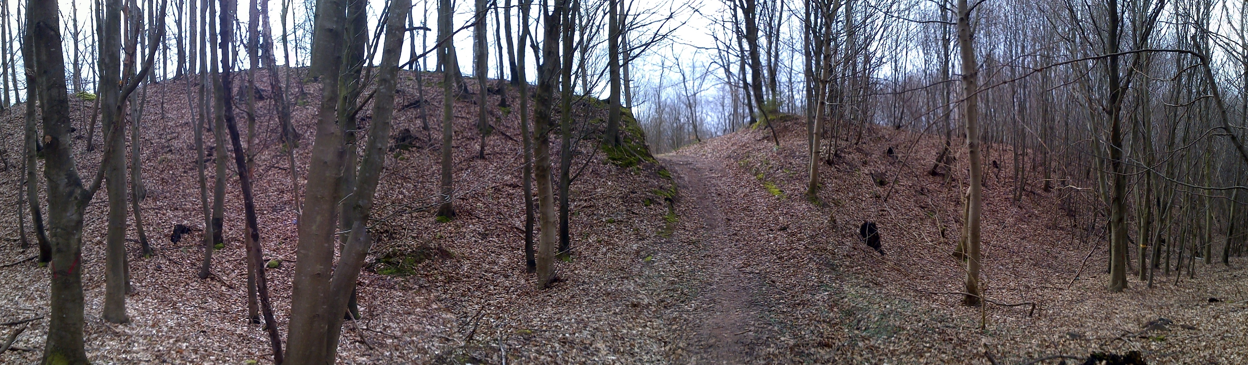 Col de Saverne - Randonnée Club Vosgien